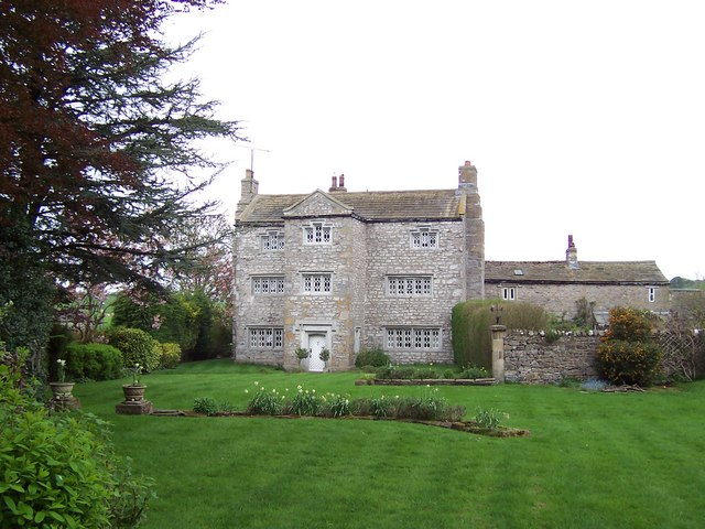 Swinden Hall, built in 1657